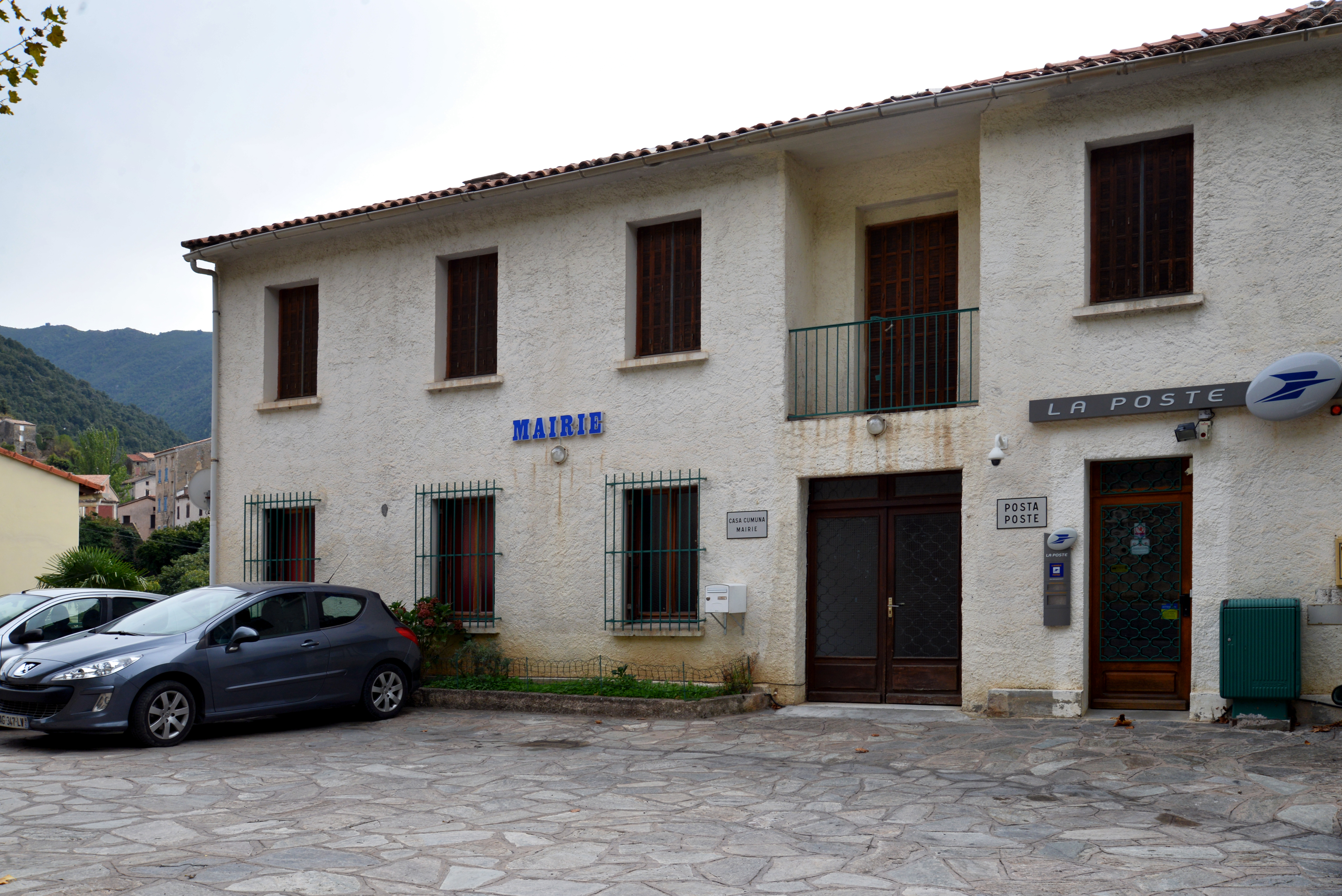 Omessa, Talcini (Corse) - La mairie et le bureau de la Poste